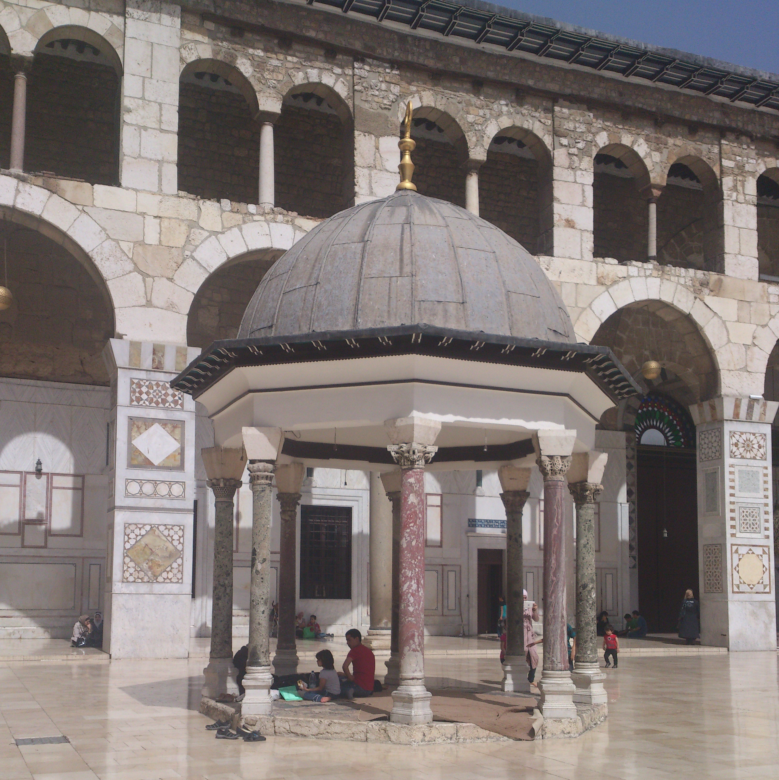 الجامع الأموي